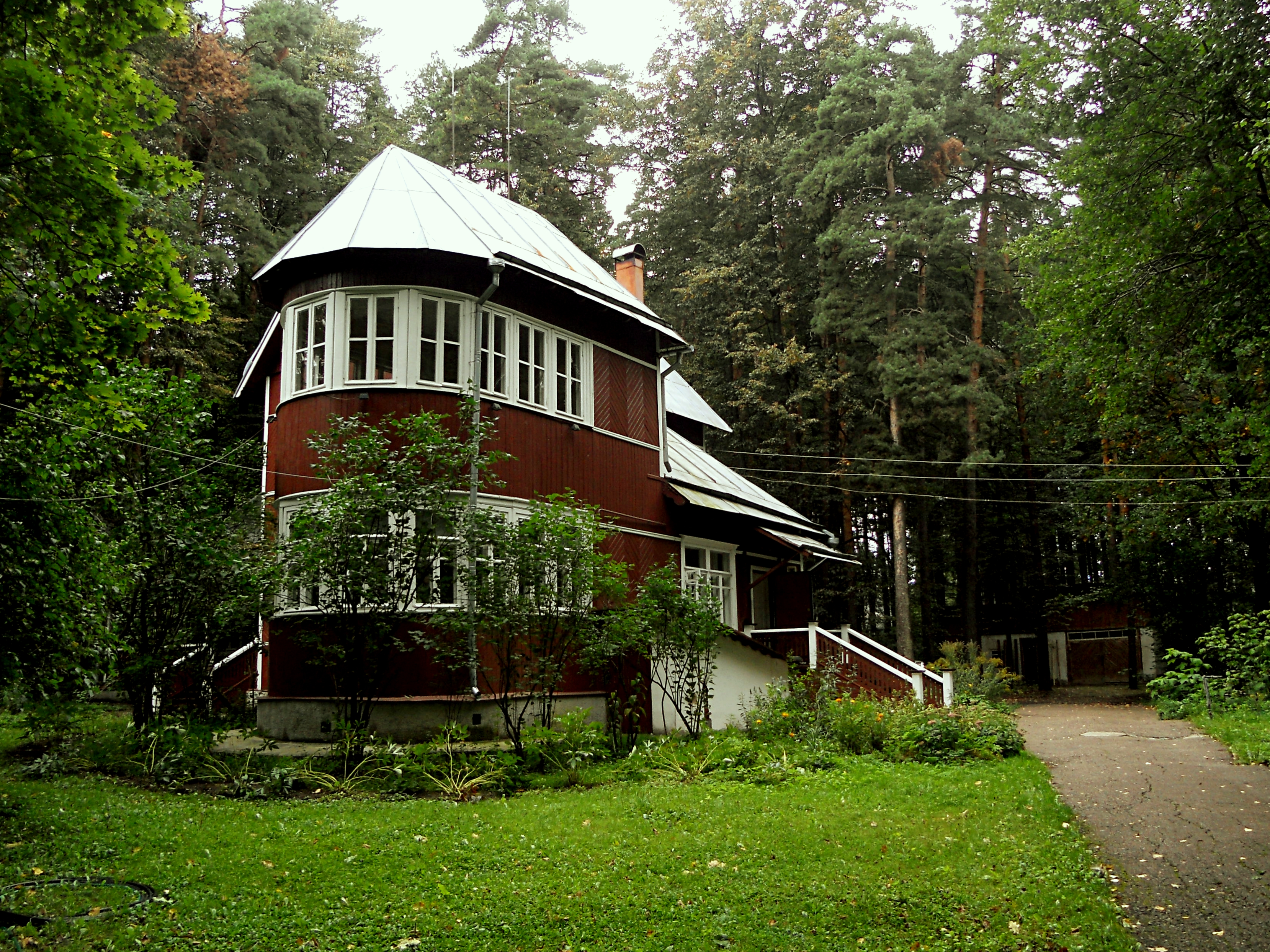 Дом, где жил и работал Б. Л. Пастернак (в 1939-1960 гг.): улица Павленко, 3, Переделкино, Новомосковский округ, Москва